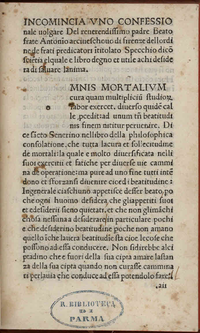 Confessionale. - [Firenze] : [Tipografo del Vergilius], [circa 1488-1490]. - 84 c. ; a-h⁸, I-K⁸, l4 ; 4º. - Si tratta del Confessionale "Omnis mortalium cura". - GW attribuisce la stampa al Tipografo del Benignus. - Proctor attribuisce la stampa a Bartolomeo de' Libri. - Mancano le cc. a1, b1, d3 .